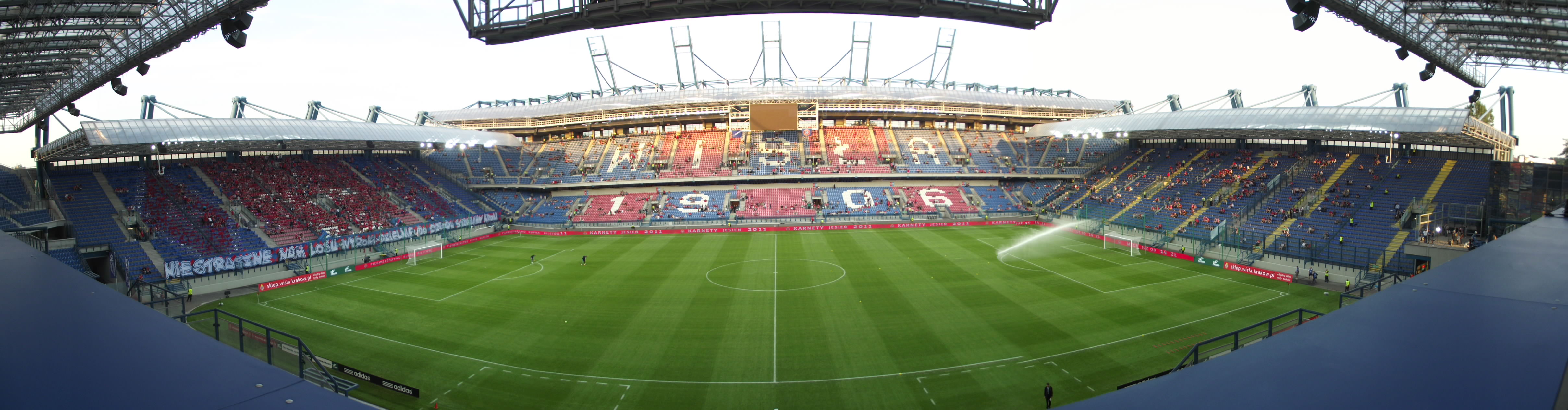 Zdjęcie zrobione podczas meczu eliminacji do Ligi Mistrzów UEFA pomiędzy Wisłą Kraków a Litexem Łowecz.